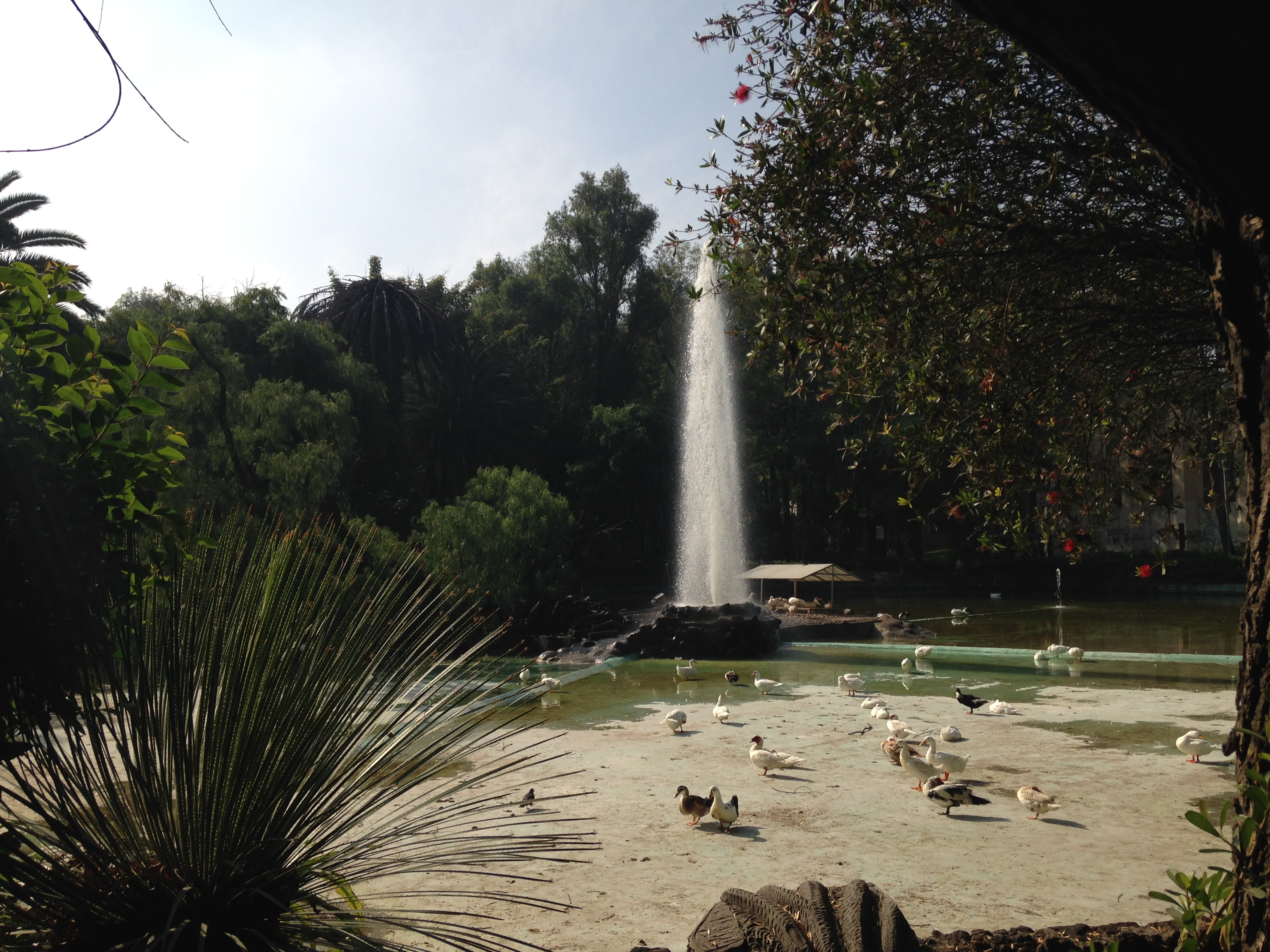 Fuente ubicada en el parque México